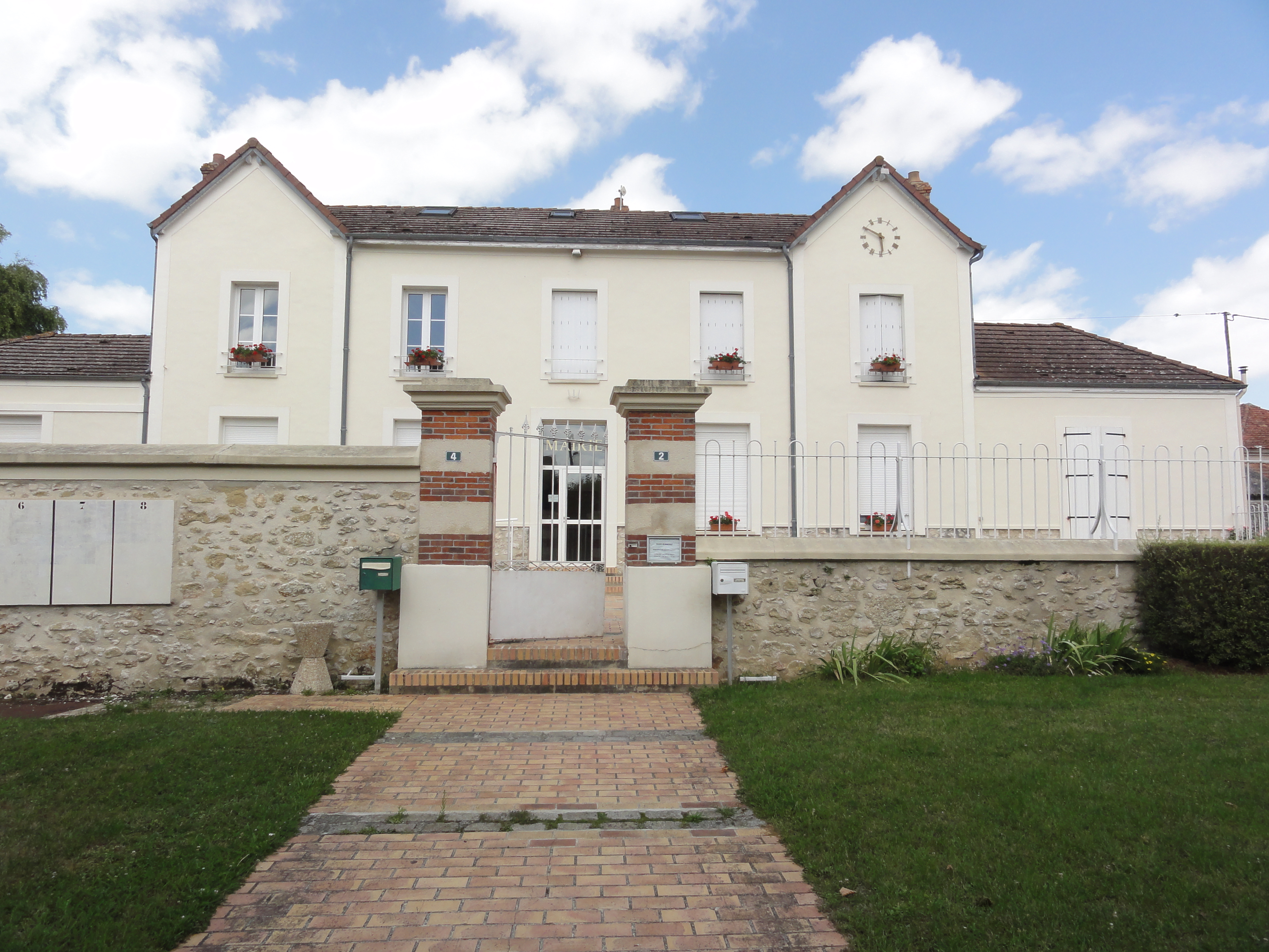 Mortery (Seine-et-Marne) La mairie town halls in Seine-et-Marne